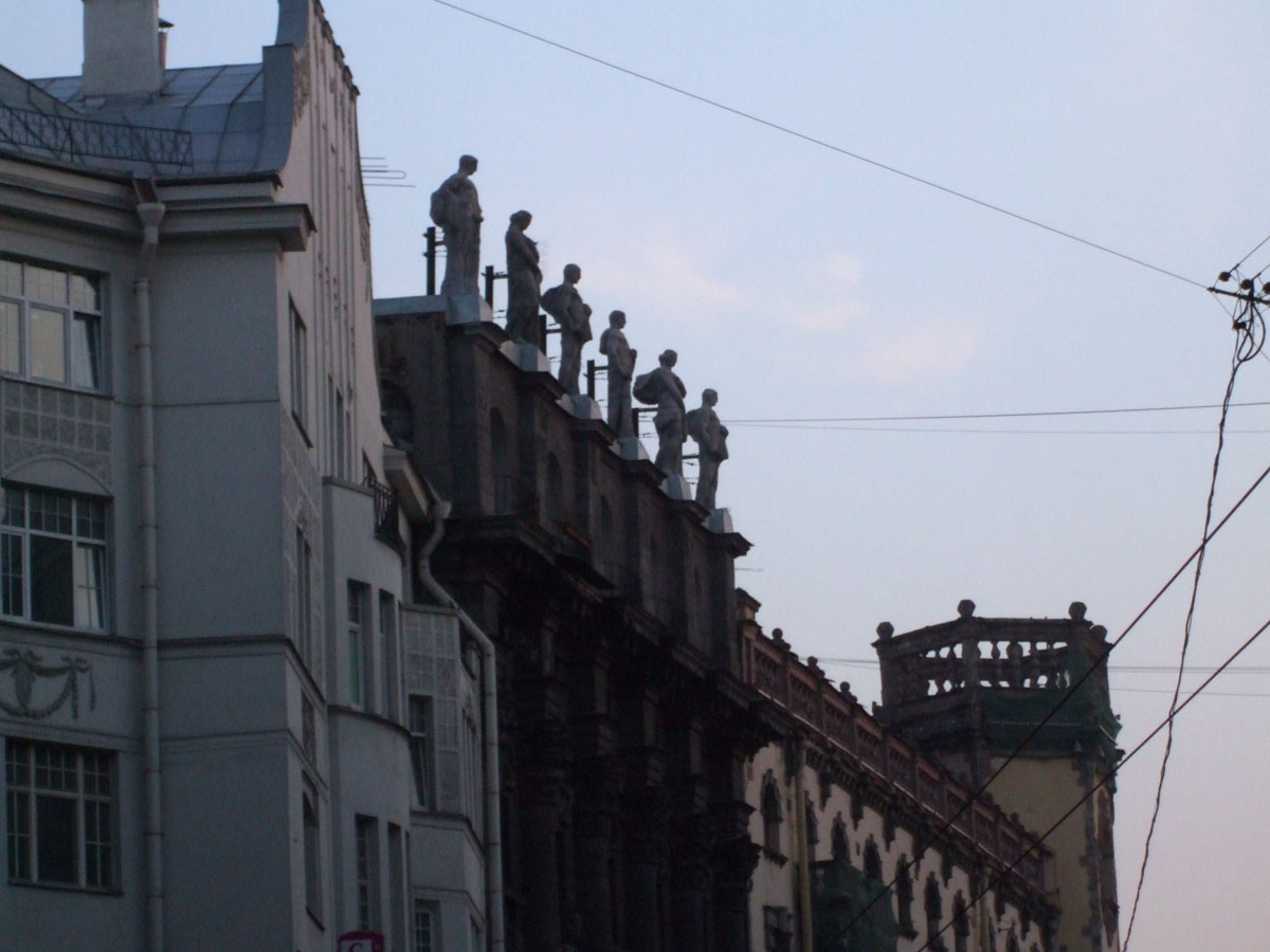 Театр им. Миронова на Большом Проспекте Петроградской Стороны